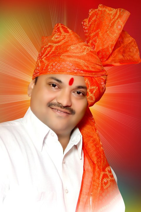 Img.yogesh patil